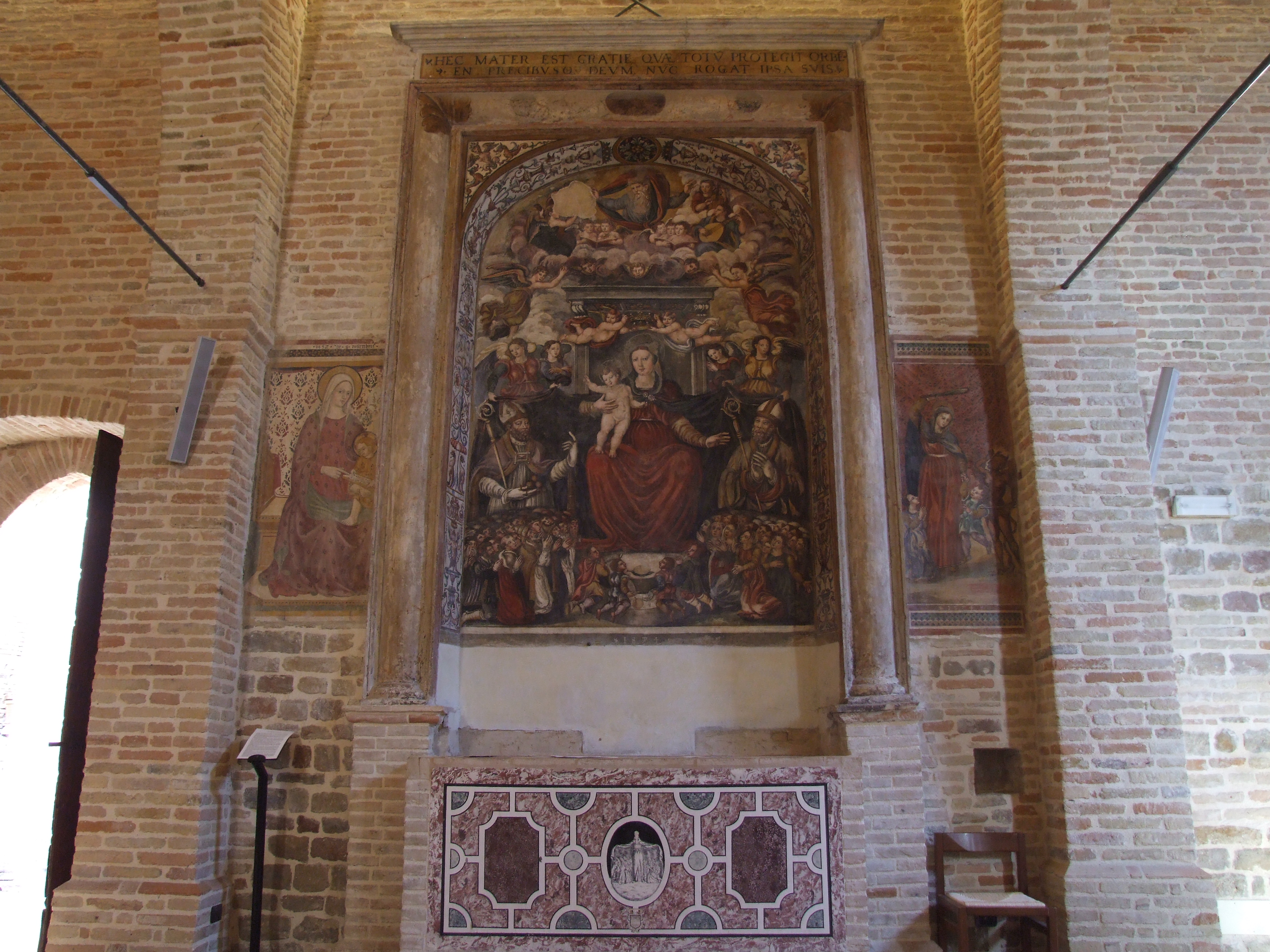 Chiesa di San Michele This is a photo of a monument which is part of cultural heritage of Italy.